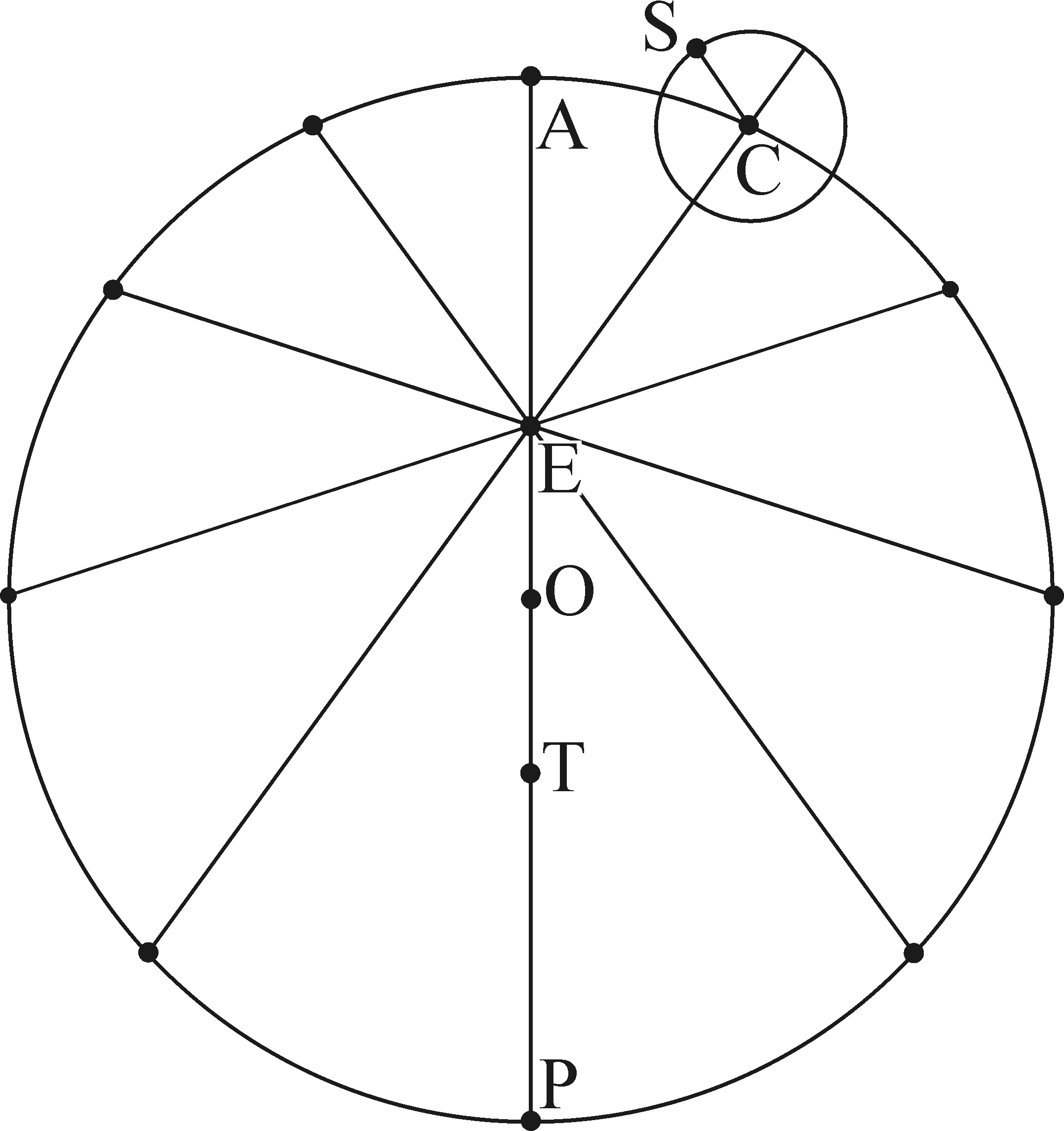 Эквант